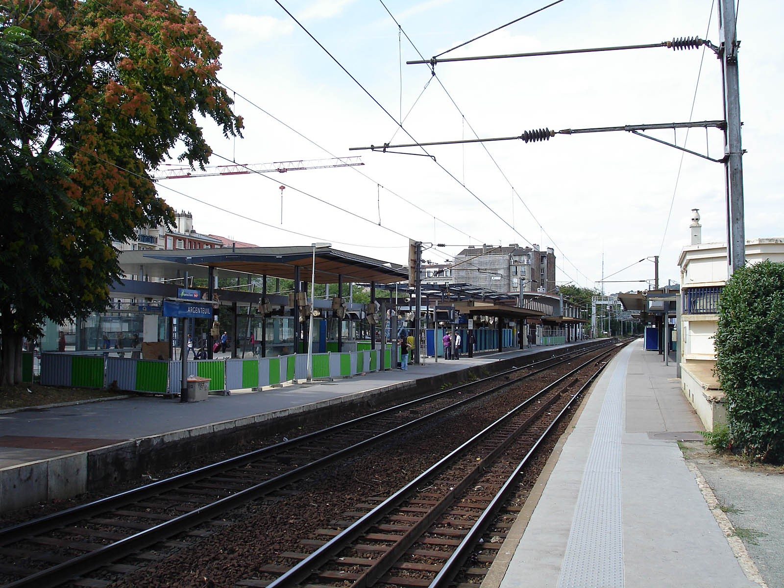 La gare d'Argenteuil, Val-d'Oise, France.